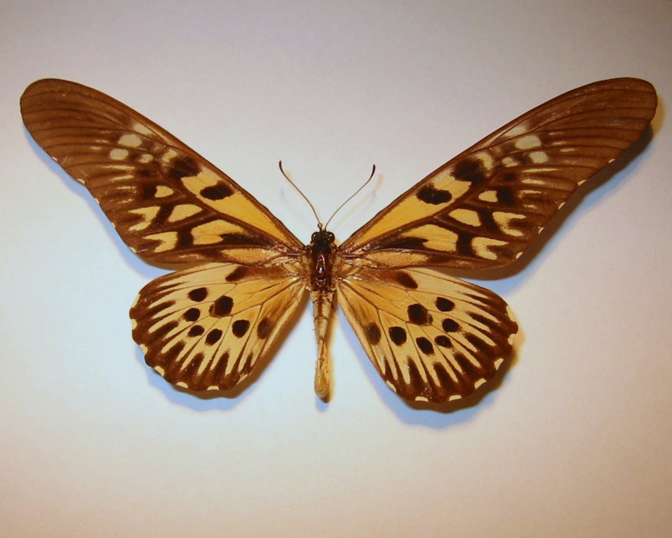 Papilio antimacchus (male)